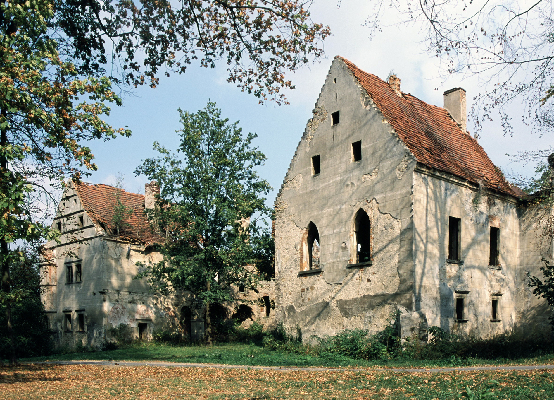 Warta Bolesławiecka - dwór (ruina) 04.1951.